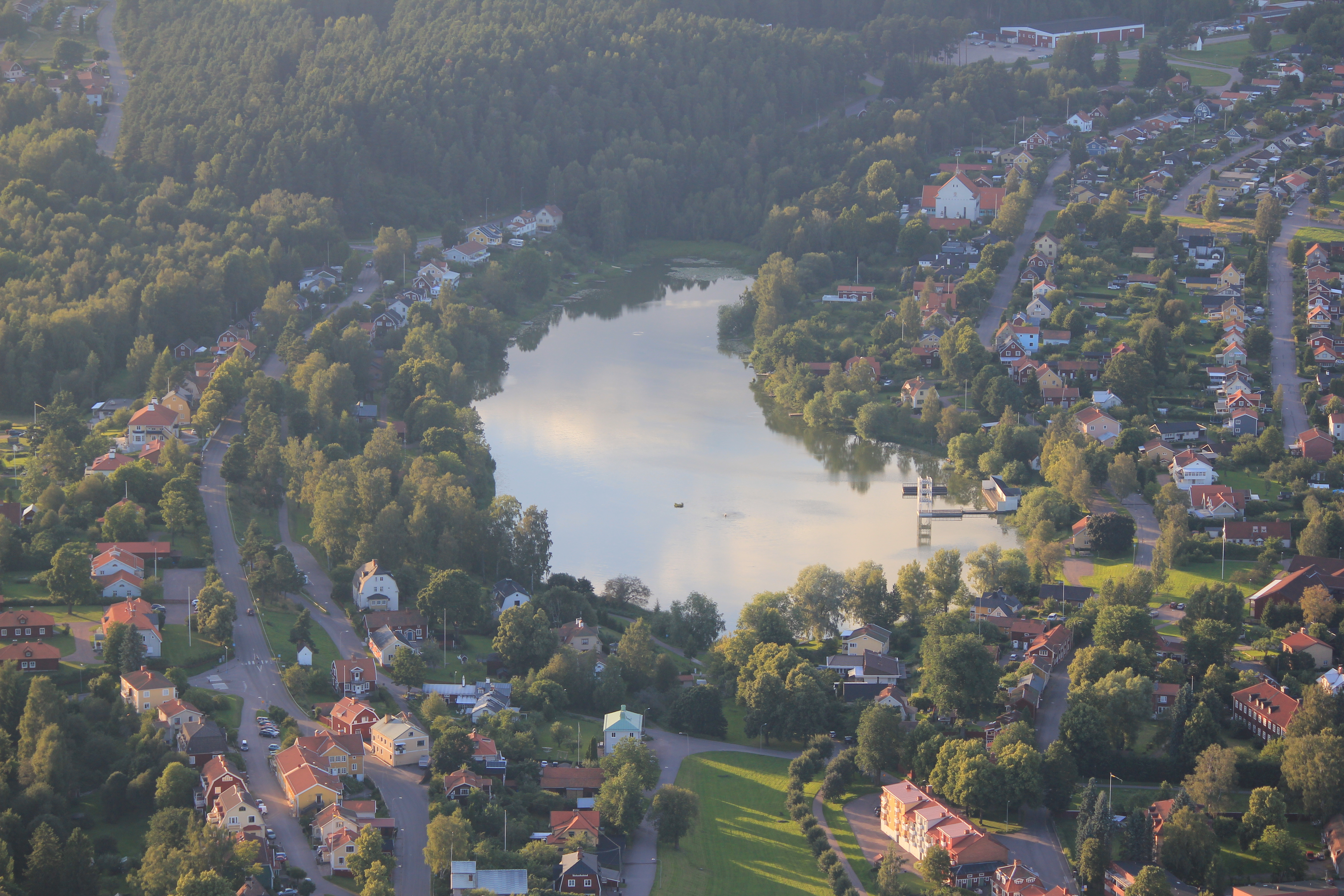 Hedemora, Dalarnas län, Sverige This aerial photograph has been approved for publishing by the Swedish Armed Forces with the ID: FMTM 10 830:11043 This tag does not indicate the copyright status of the attached work. A normal copyright tag is still required. See Commons:Licensing for more information. English | svenska | +/−